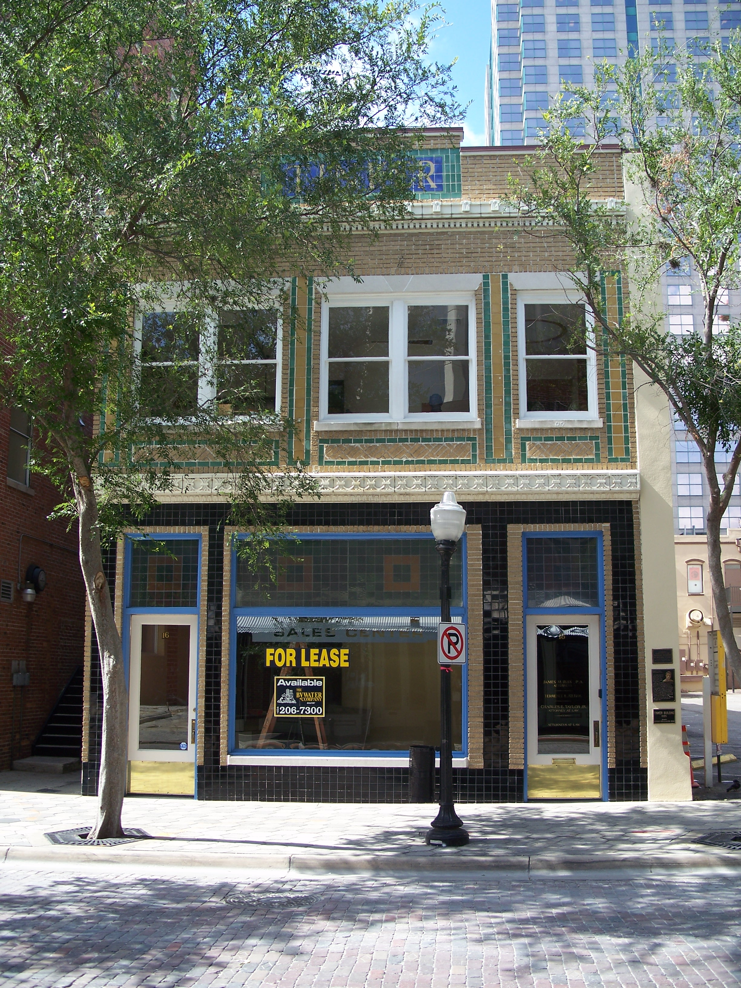 Tinker Building, in Orlando, Florida